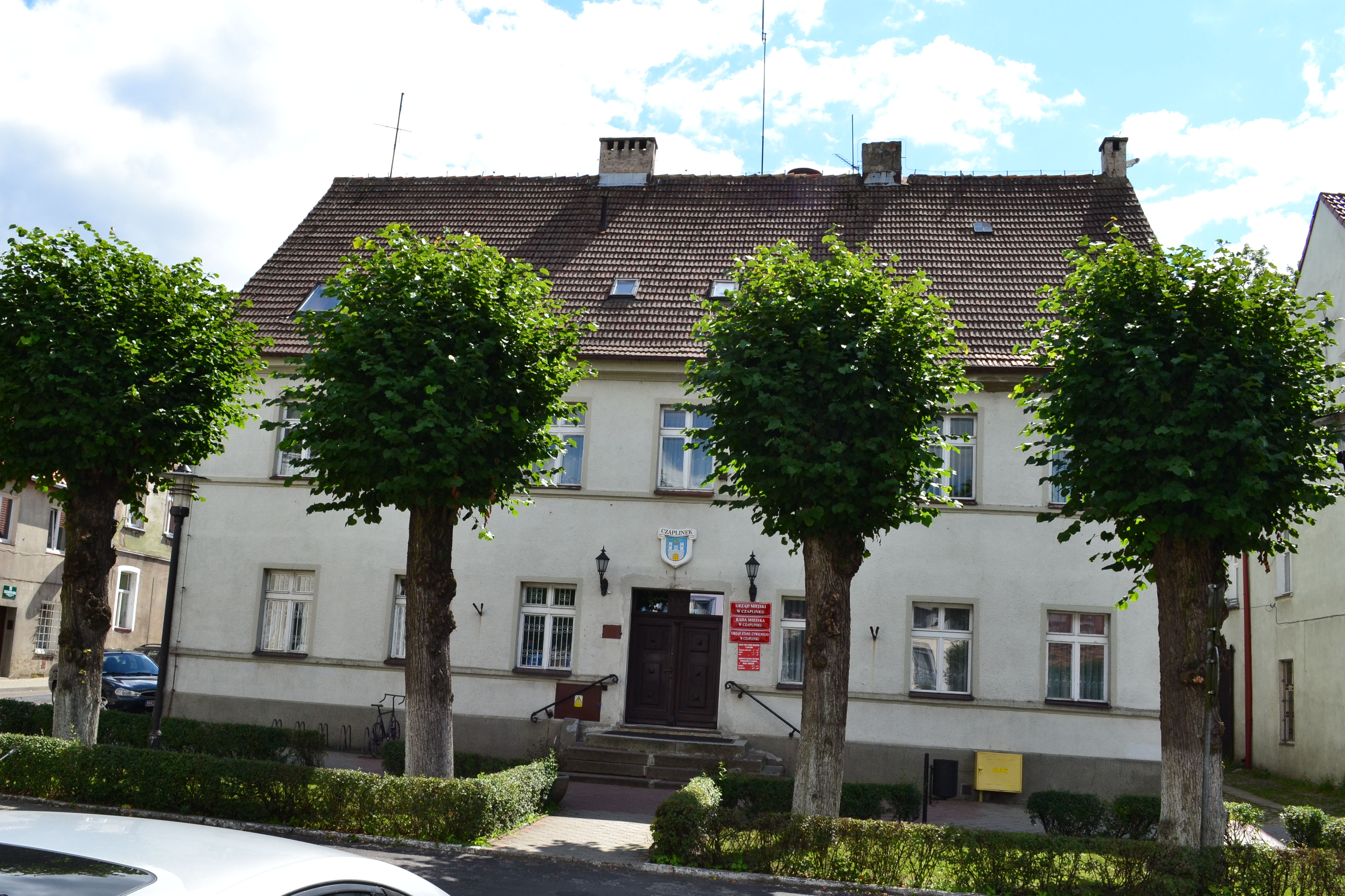 Czaplinek, Rynek 6 - Ratusz / Urząd Miejski (zabytek nr 439)